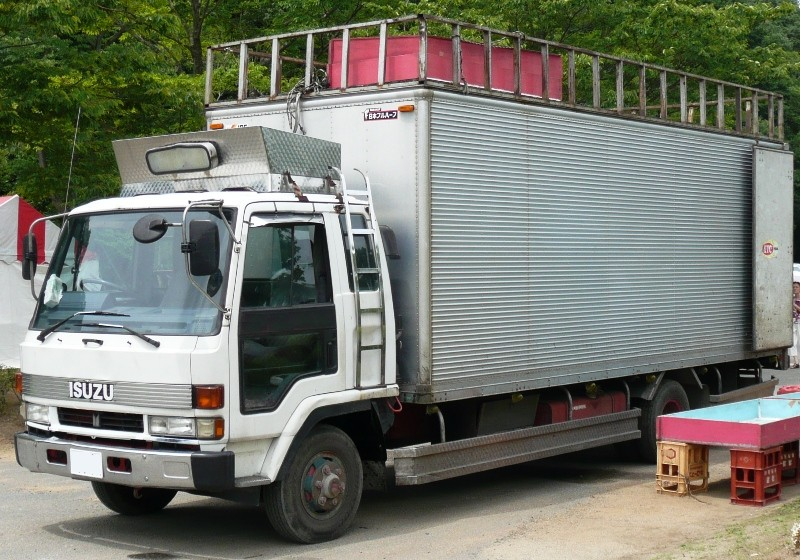 Isuzu Forward.